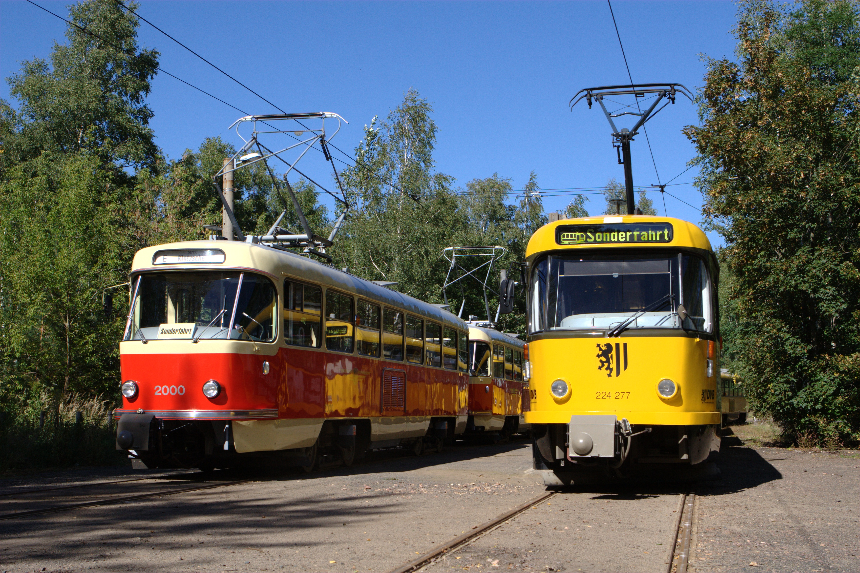 Roter Tatra T4 2000 des Straßenbahnmuseums Dresden und gelber T4 der Dresdner Verkehrsbetriebe in der Gleisschleife Diebsteig